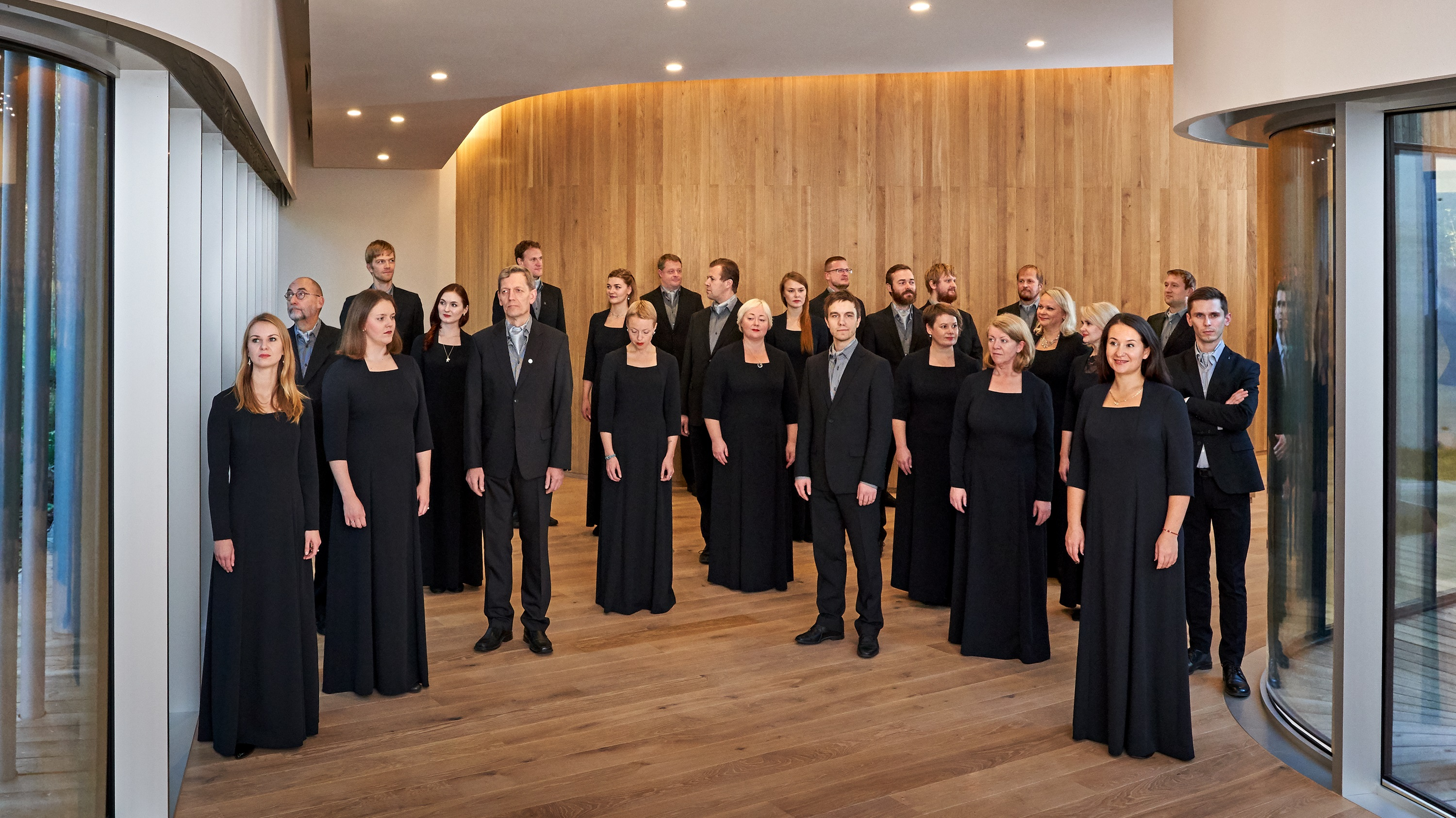 EFK Arvo Pärdi Keskuses Foto: Kaupo Kikkas